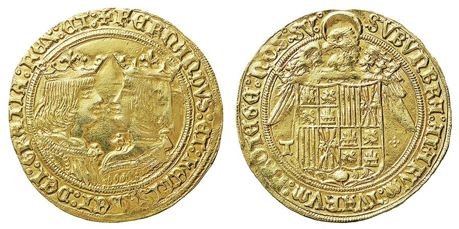 REYES CATÓLICOS. Doble Excelente. AV. Toledo. s/f. Con T y cruz formada por puntos a los lados del escudo. 7,05 g. Cal.96. Muy escasa. EBC.